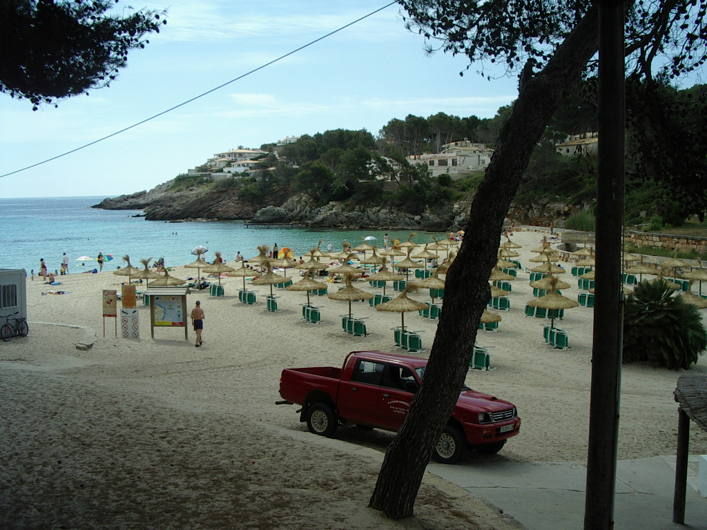 Die Badebucht Sa Font de sa Cala